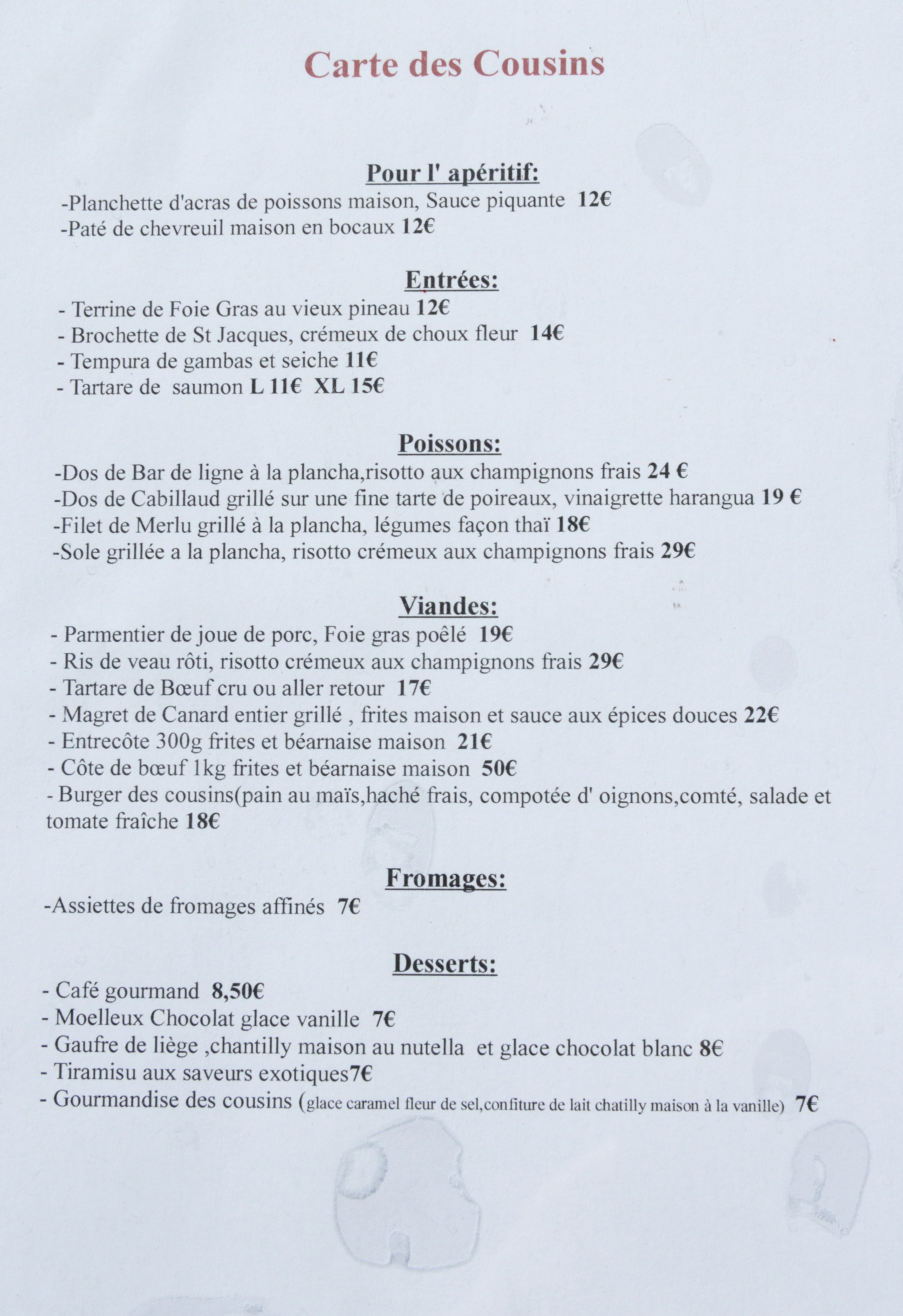 La carte 2013 du restaurant de cuisine traditionnelle française "L' Atelier des Cousins" situé au 10 rue Chef de Ville à La Rochelle. La Rochelle, Charente Maritime, France.